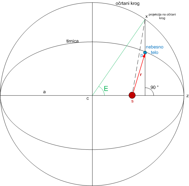 Ekscentrična anomalija.